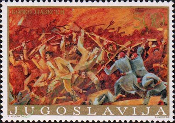 Borko Lazeski